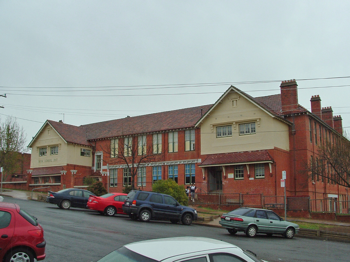 Wagga Wagga High School. Est: 1917